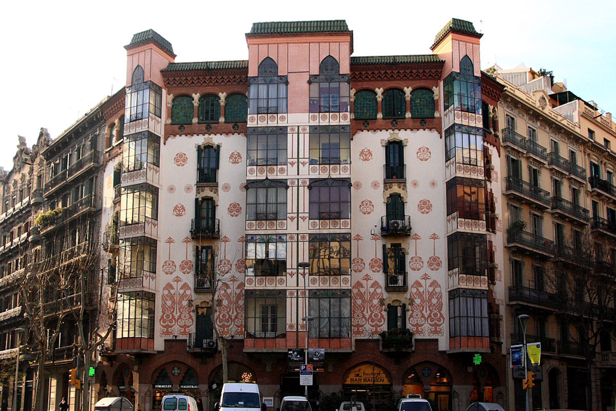 Casa Llopis Bofill (C/Bailen 113) a Barcelona. Obra d'Antoni Maria Gallissà i Soqué, esgrafiats de Josep Maria Jujol. Modernista. 1902